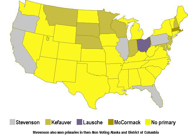 1956 Democratic presidential primaries